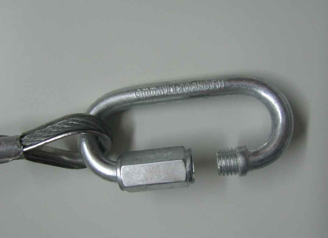 Schnellverbindungsglied als Safety